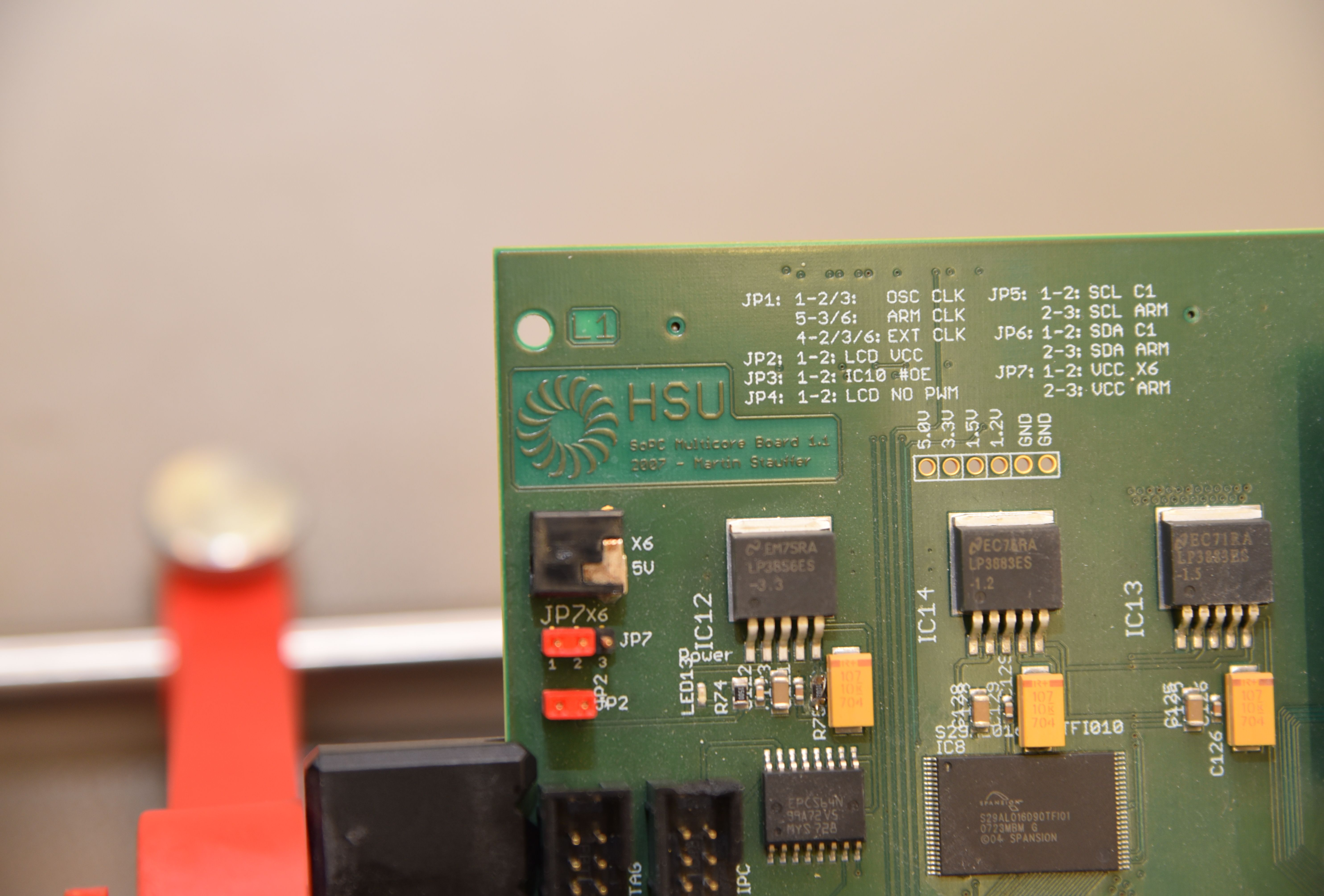 Lehrplatine der Hochschule Ulm